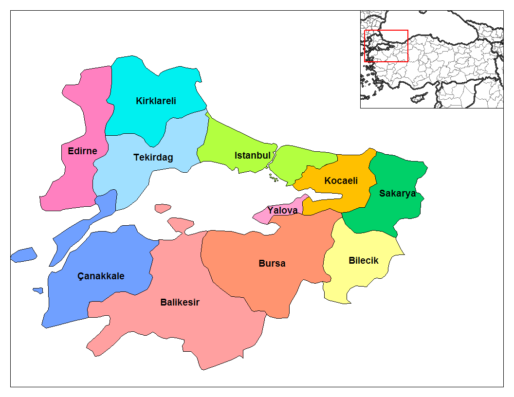 Marmara Region, Turkey